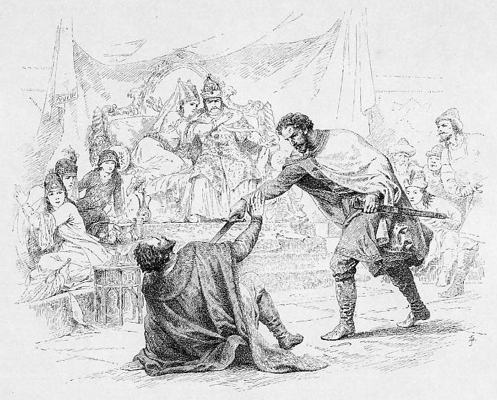 Великие Князья Юрий Данилович и Димитрий Михайлович. 1319-1327 г.С кончиною Михаила Тверского, великокняжеский престол достался Юрию, но вскоре был отнят Димитрием. Мстя за убийство отца, Димитрий Михайлович, "Грозные Очи", сразил Юрия в ханской ставке, не убоявшись расправы свирепого хана.